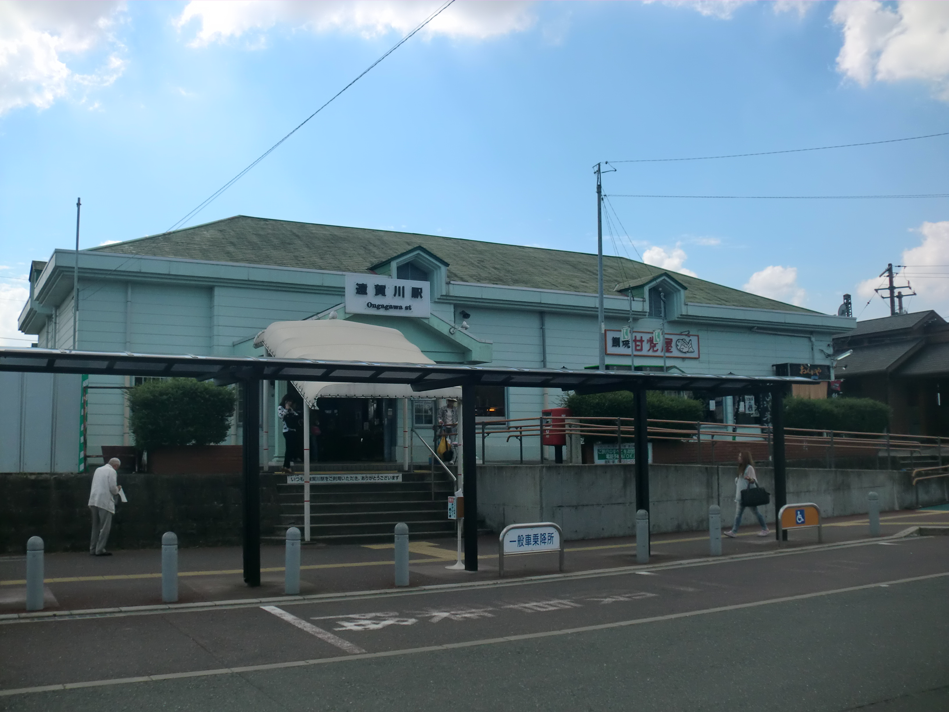 福岡県遠賀郡遠賀町にある遠賀川（おんががわ）駅